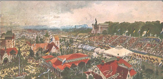 Aquarell von Michael Zeno Diemer